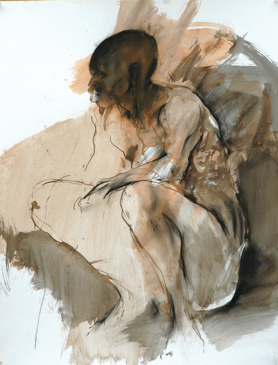 Franta, Čekání (2005), barevná tuš na papíru 65 x 50 cm